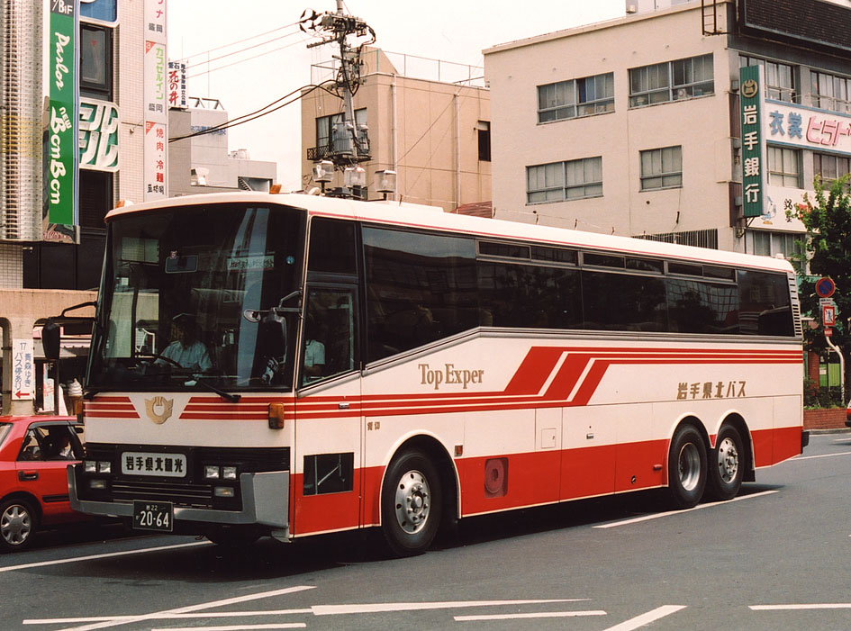 岩手県北自動車 Top Exper P-DA66U